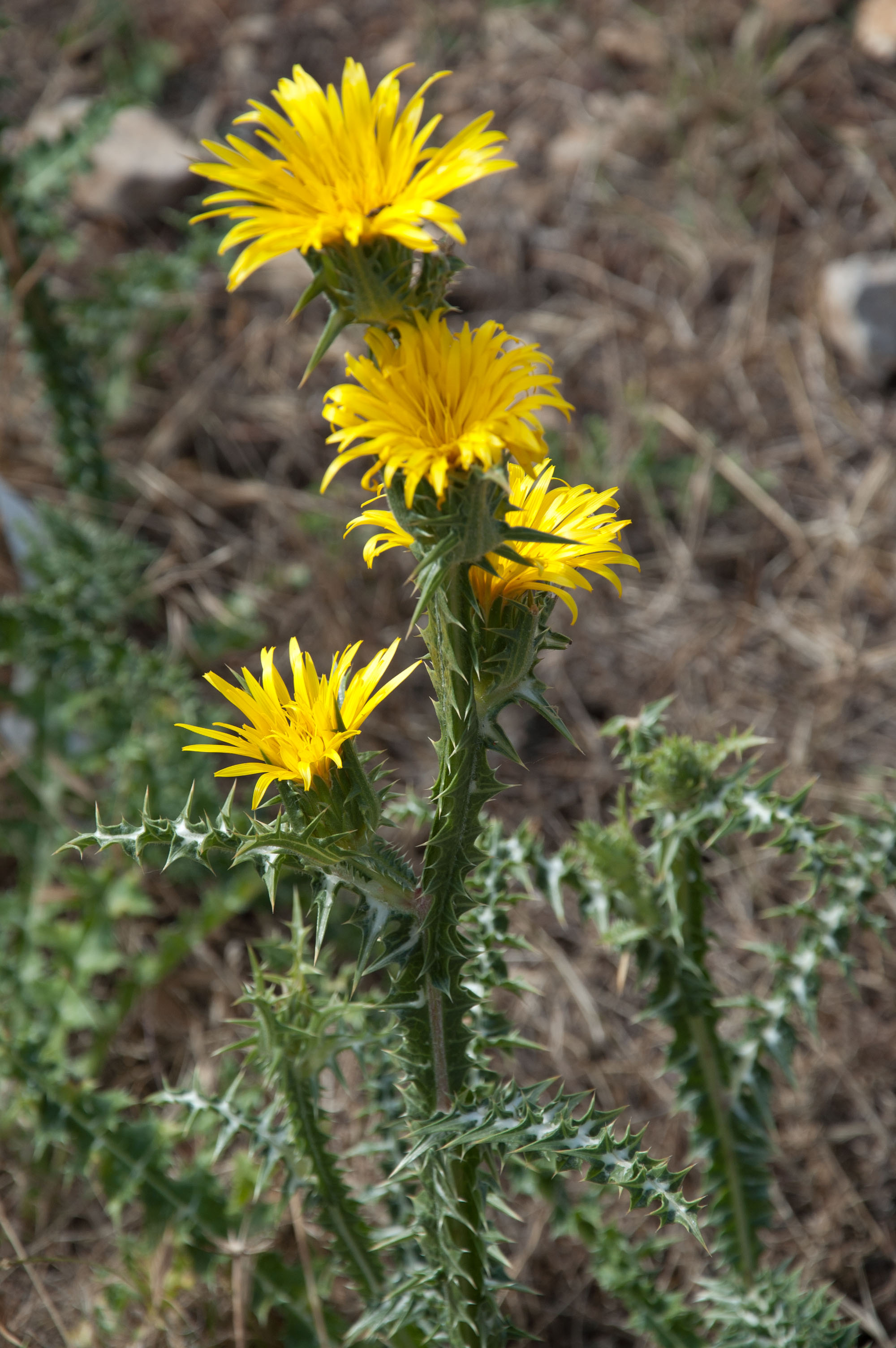 Scolymus grandiflorus Desf. Riserva naturale Monte Pellegrino